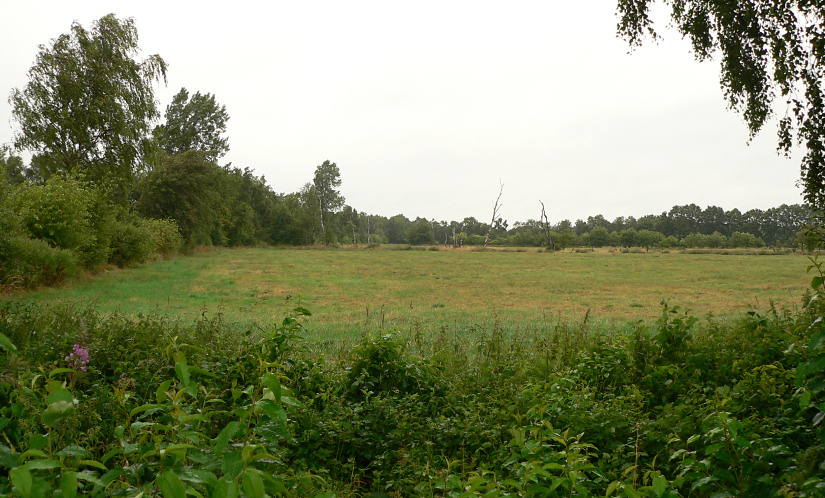 Wiese irgendwo im Lichtenmoor, Niedersachsen (im Landkreis Nienburg/Weser oder im Landkreis Heidekreis; im Bereich Lichtenmoor gibt es mehrere Naturschutzgebiete, unklar ob in einem oder wenn ja, in welchem)